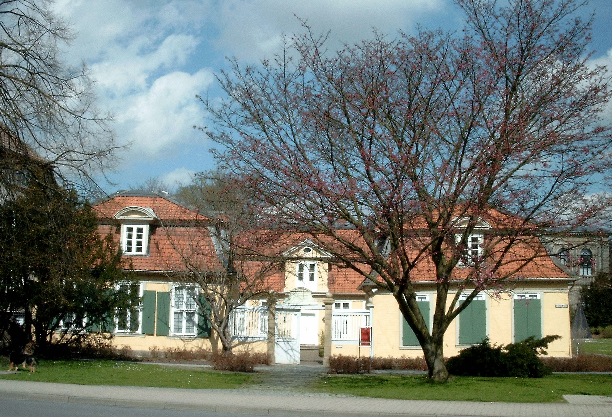 Lessinghaus in Wolfenbüttel, ein Gebäude des Bibliothekquartiers der Herzog August Bibliothek Wolfenbüttel (HAB), von Süden gesehen. G. E. Lessing hat dieses Gebäude bewohnt, als er Bibliothekar an der HAB war.